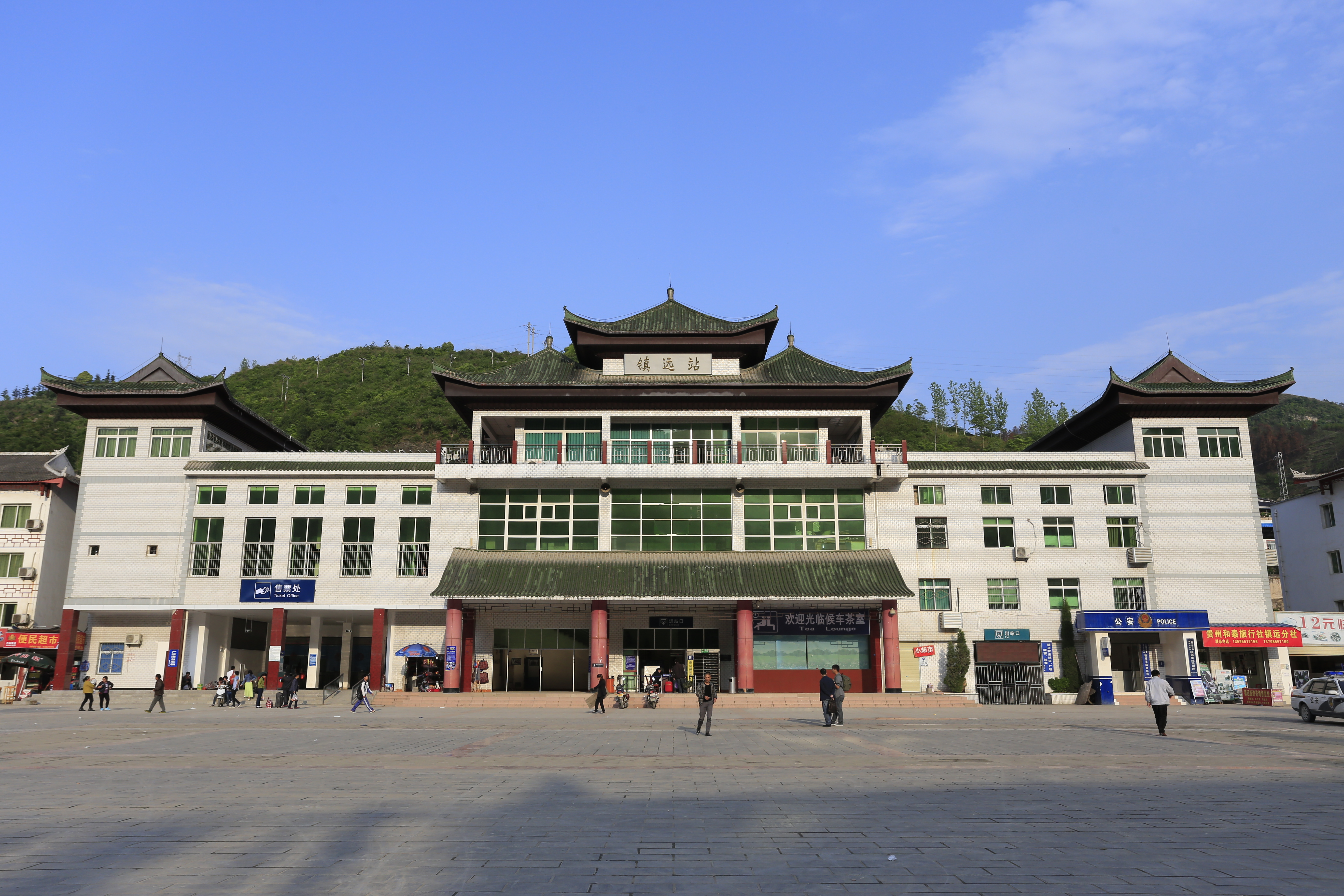 镇远火车站